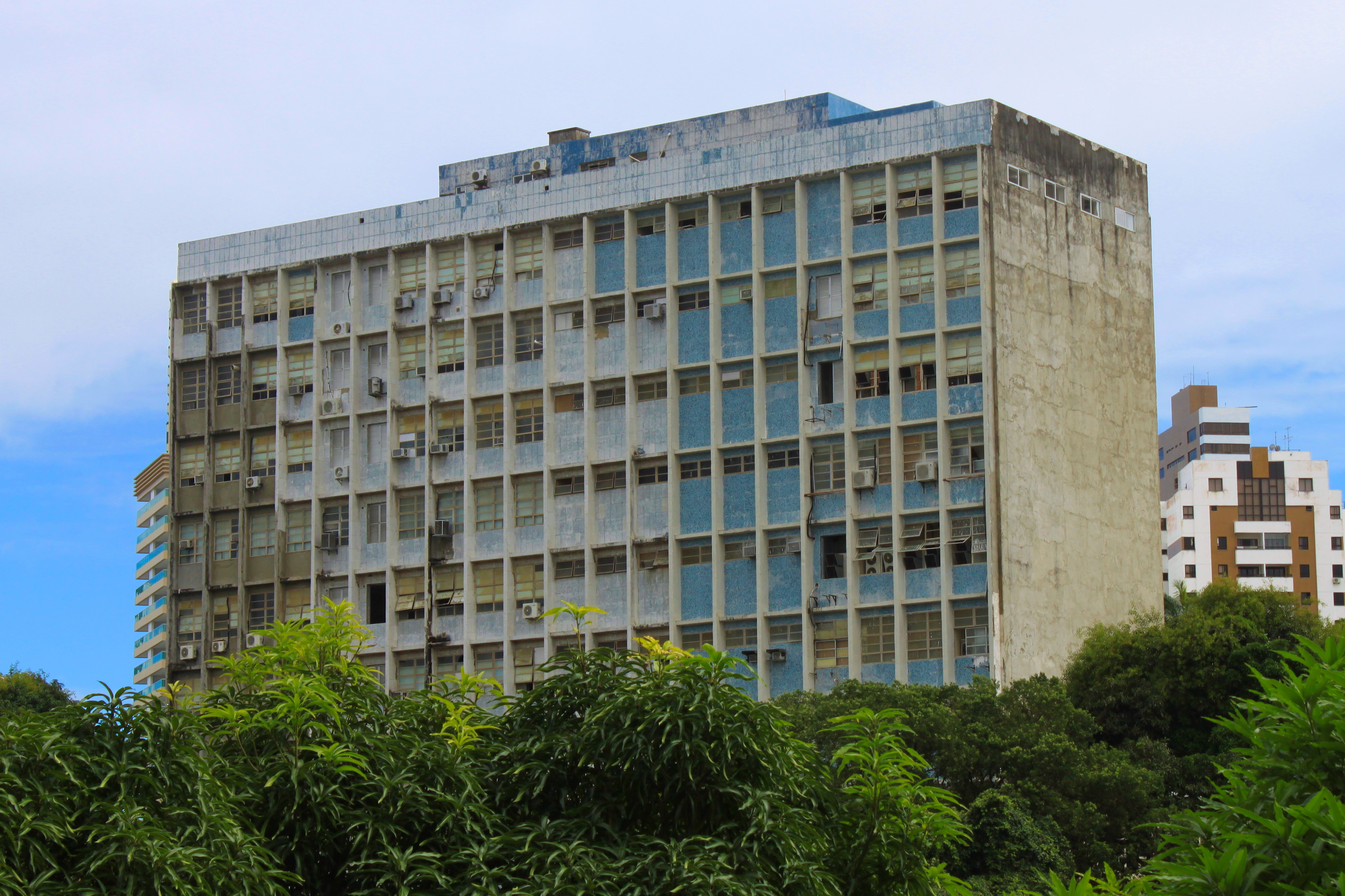 Faculdade de Odontologia da Universidade Federal da Bahia, em Salvador, Bahia.